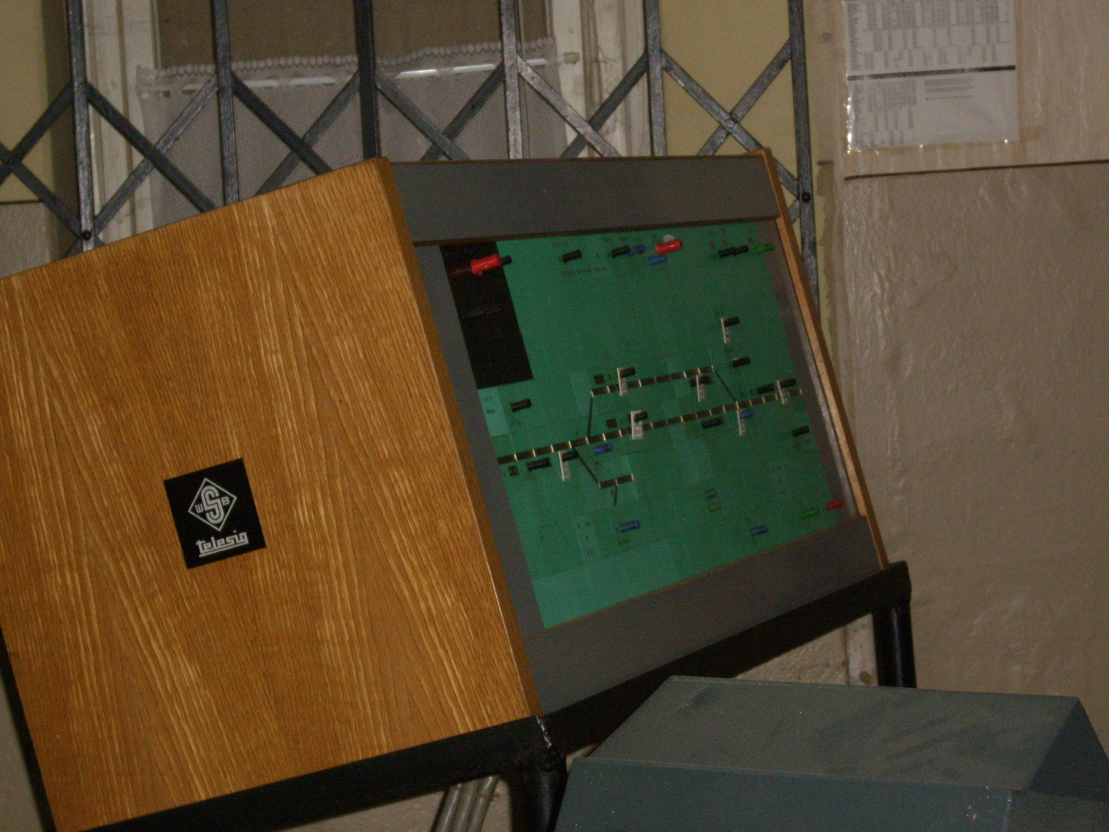 Foto eines WSSB GSII DR Stellwerks in Arendsee (Altm.)